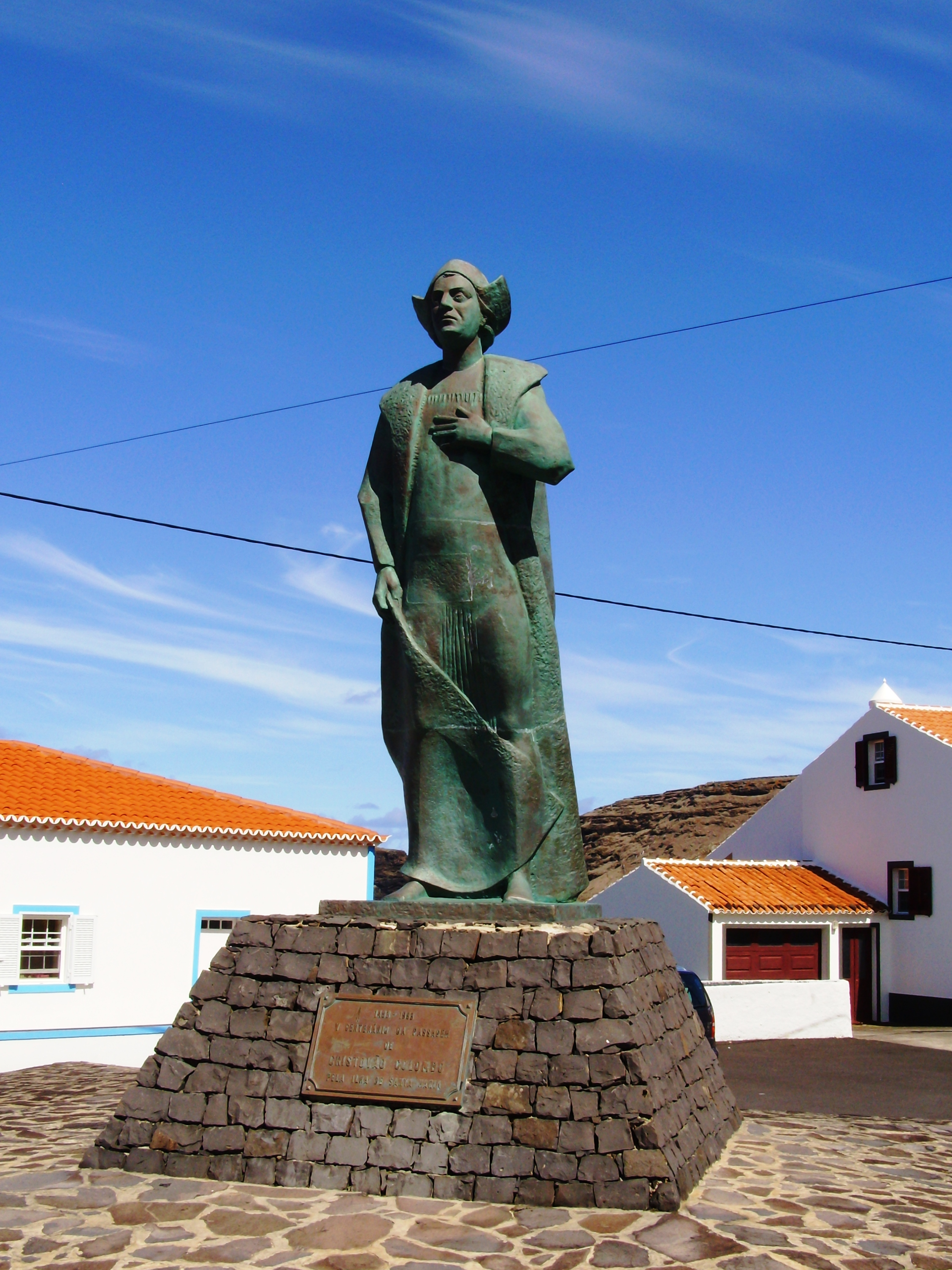 Monumento comemorativo dos 500 anos da passagem de Cristóvão Colombo pela ilha de Santa Maria (1493-1993), lugar dos Anjos, concelho de Vila do Porto, ilha de Santa Maria, Açores. Escultor: Álvaro Raposo de França. Material: bronze.